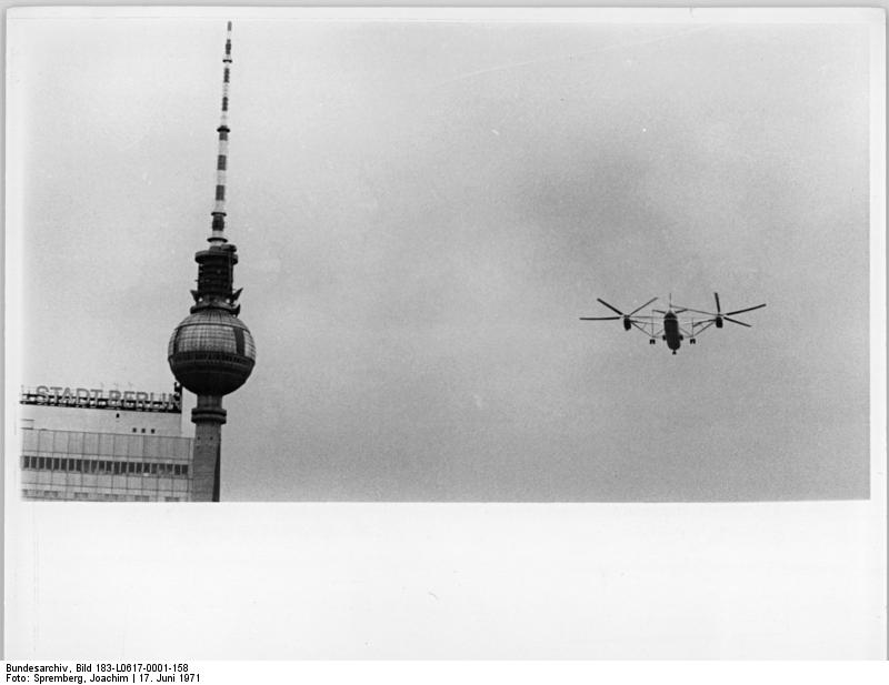 ADN-ZB Kollektiv-17.6.1971 Berlin: VIII. Parteitag der SED 3. Beratungstag Mit dem Überfliegen des Zentrums der DDR-Hauptstadt und der Werner-Seelenbinder-Halle verabschiedeten sich die Piloten des größten Hubschraubers der Welt und der TU 144, die am 13. Juni 1971 zu Ehren des VIII. Parteitages der SED in Berlin gelandet waren. (Reporter Spremberg)